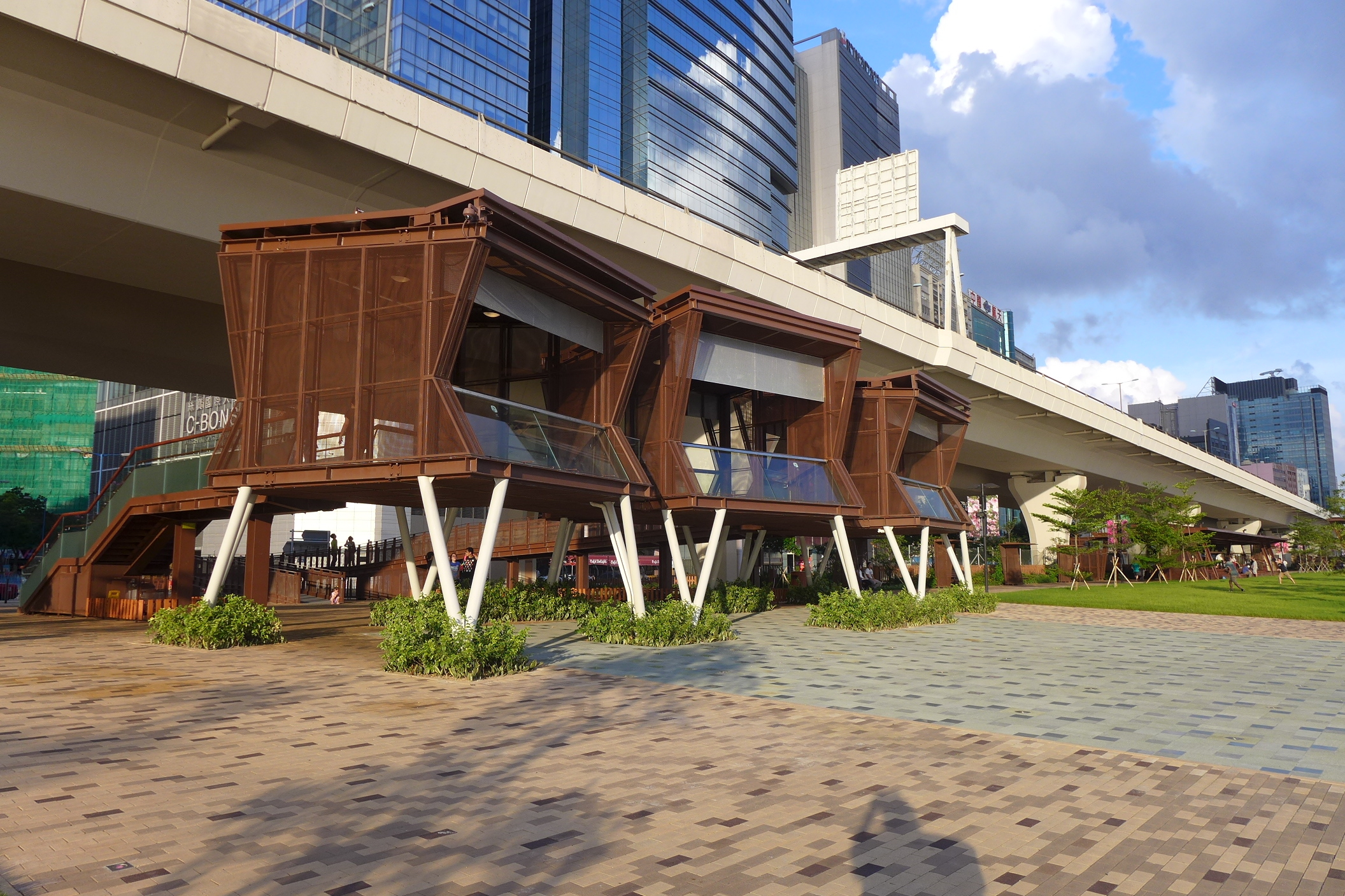 Kwun Tong Promenade Viewing Deck